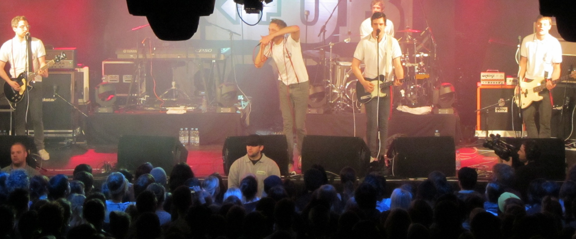 Kraftklub sprang als Vorband beim Casper Konzert (4.03.2012) in der Großen Freiheit 36 für den Rapper Cro ein.